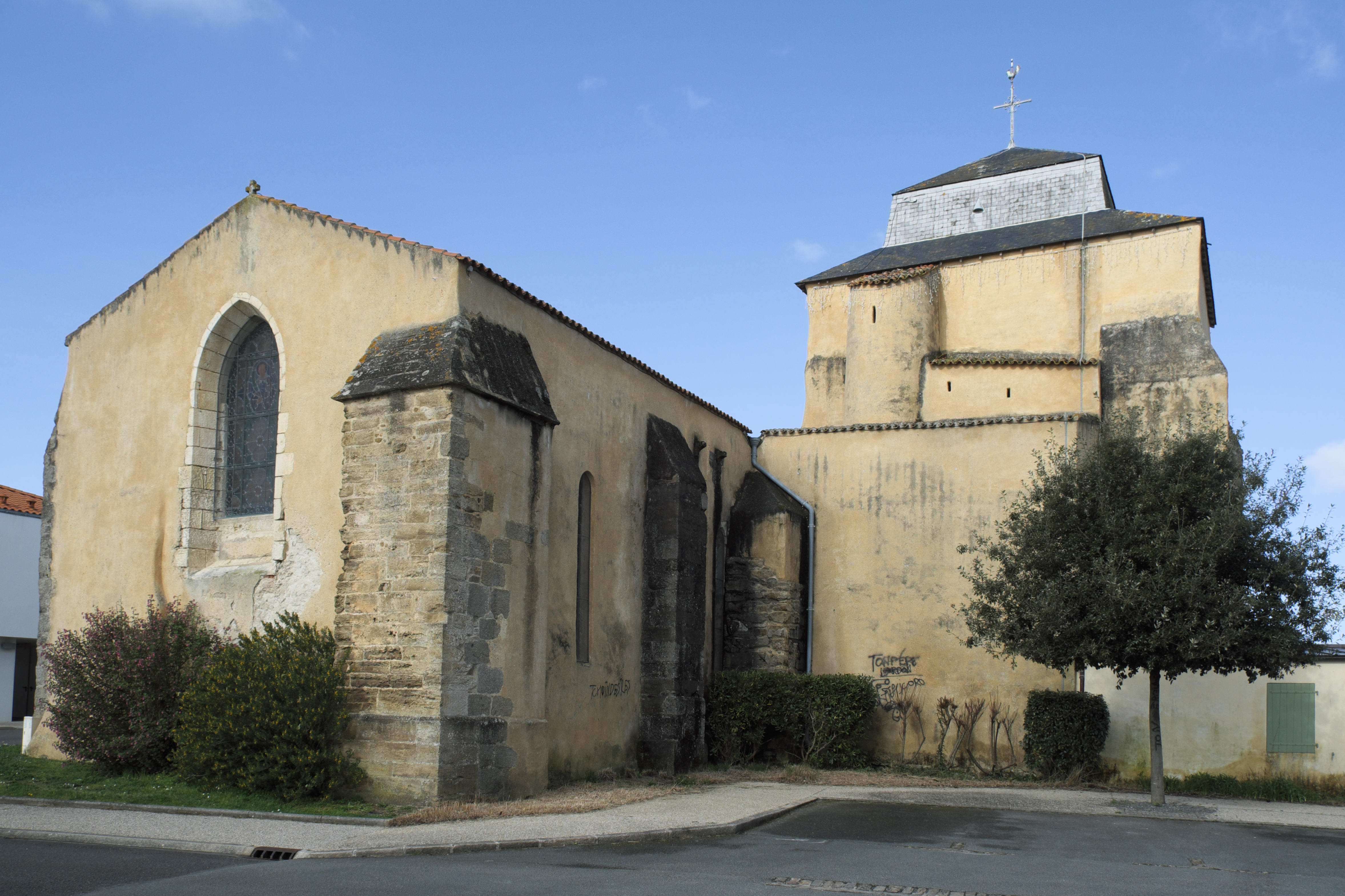 Katholische Pfarrkirche Saint-Vincent in Saint-Vincent-sur-Jard im Département Vendée (Pays de la Loire/Frankreich)